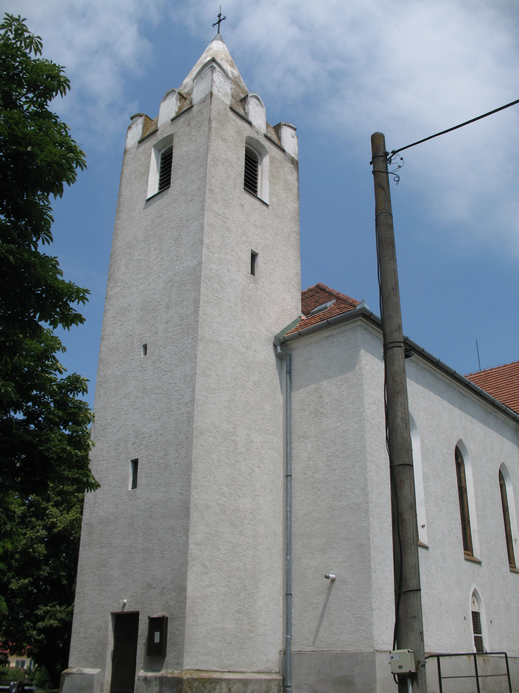 Csallóközkürt